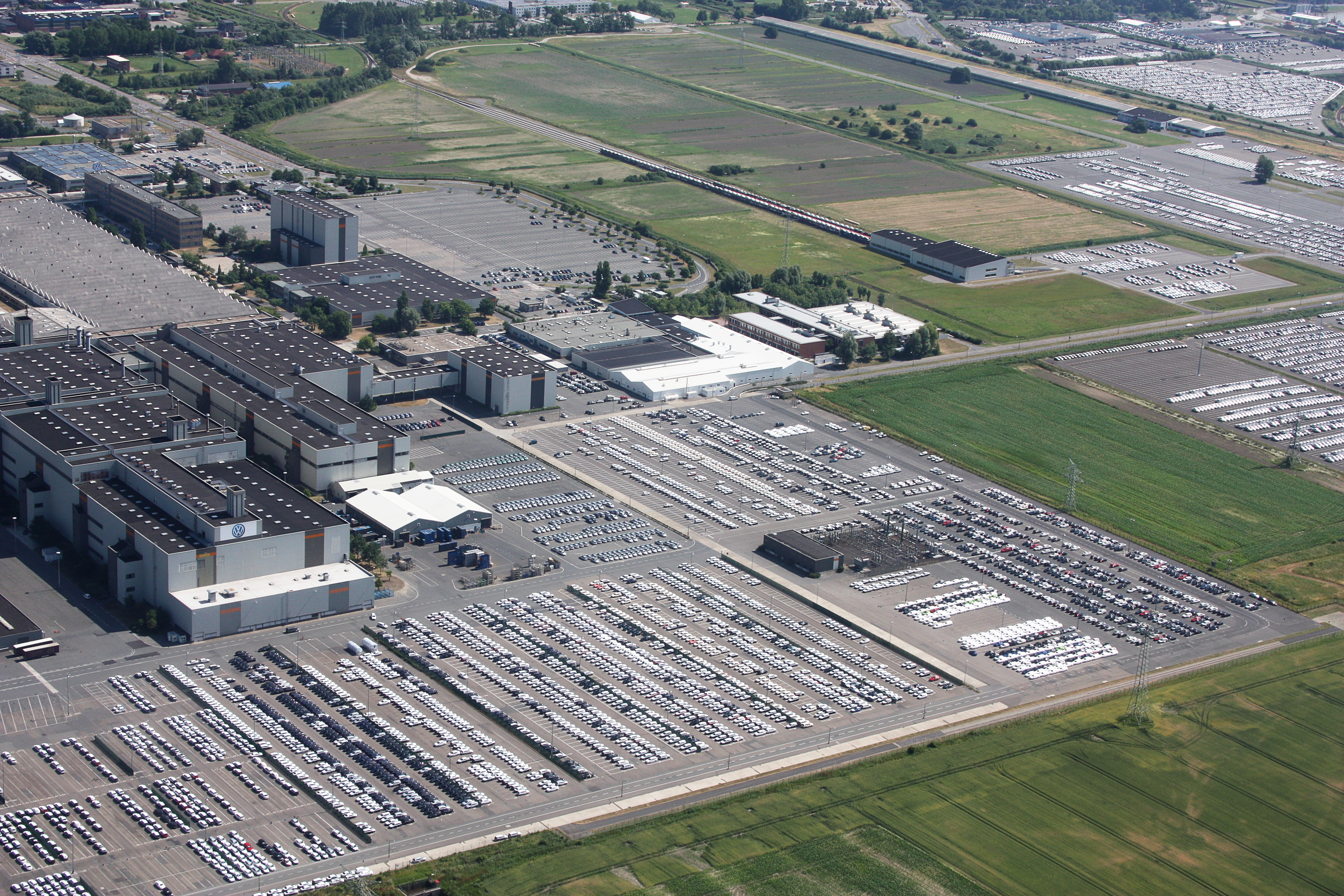 Flug über Emden; Flughöhe 1500 ft; Juli 2010; Originalfoto bearbeitet: Tonwertkorrektur und Bild geschärft mit Hochpassfilter